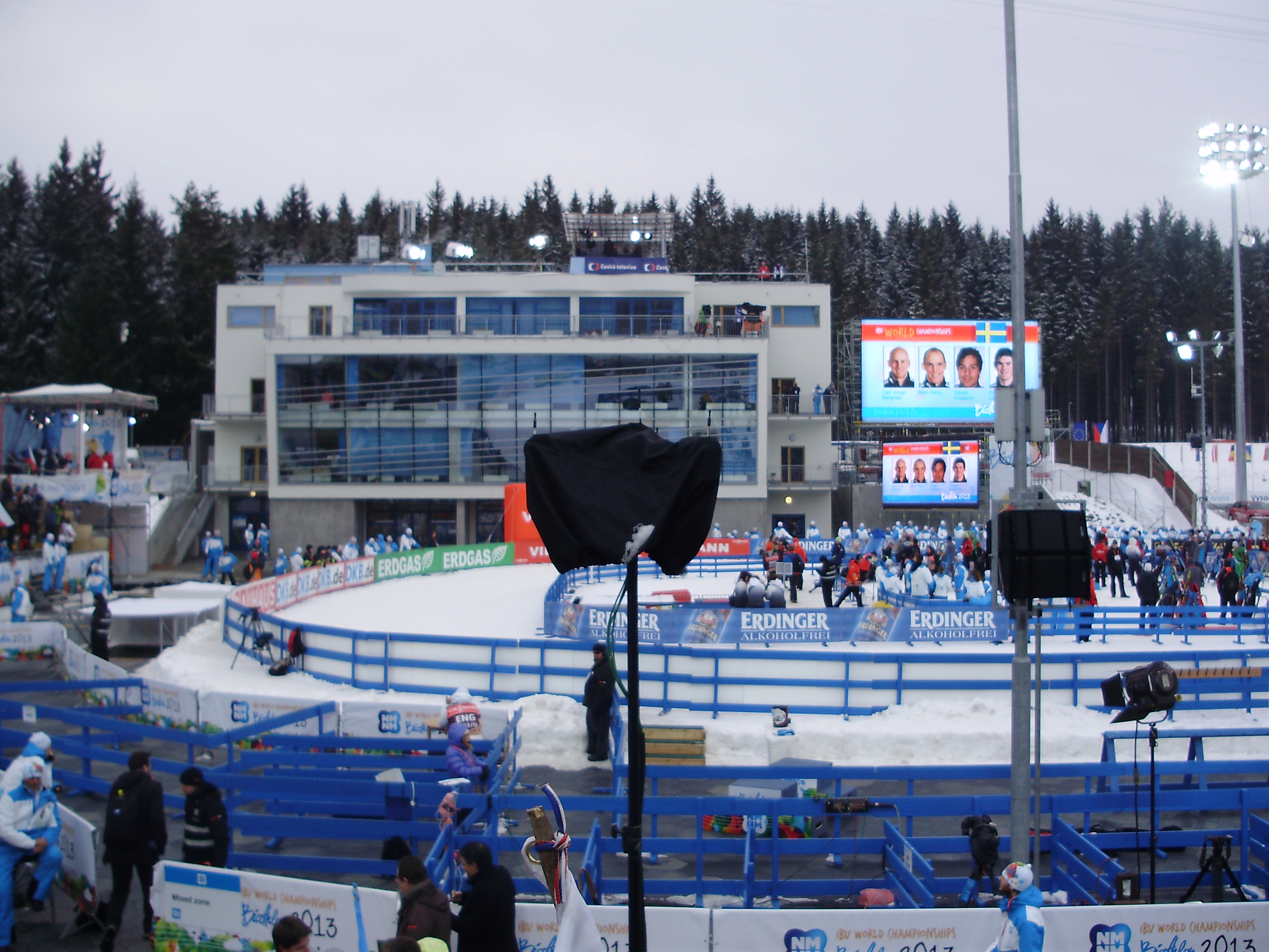 MS v Biatlonu 2013 - štafety muži